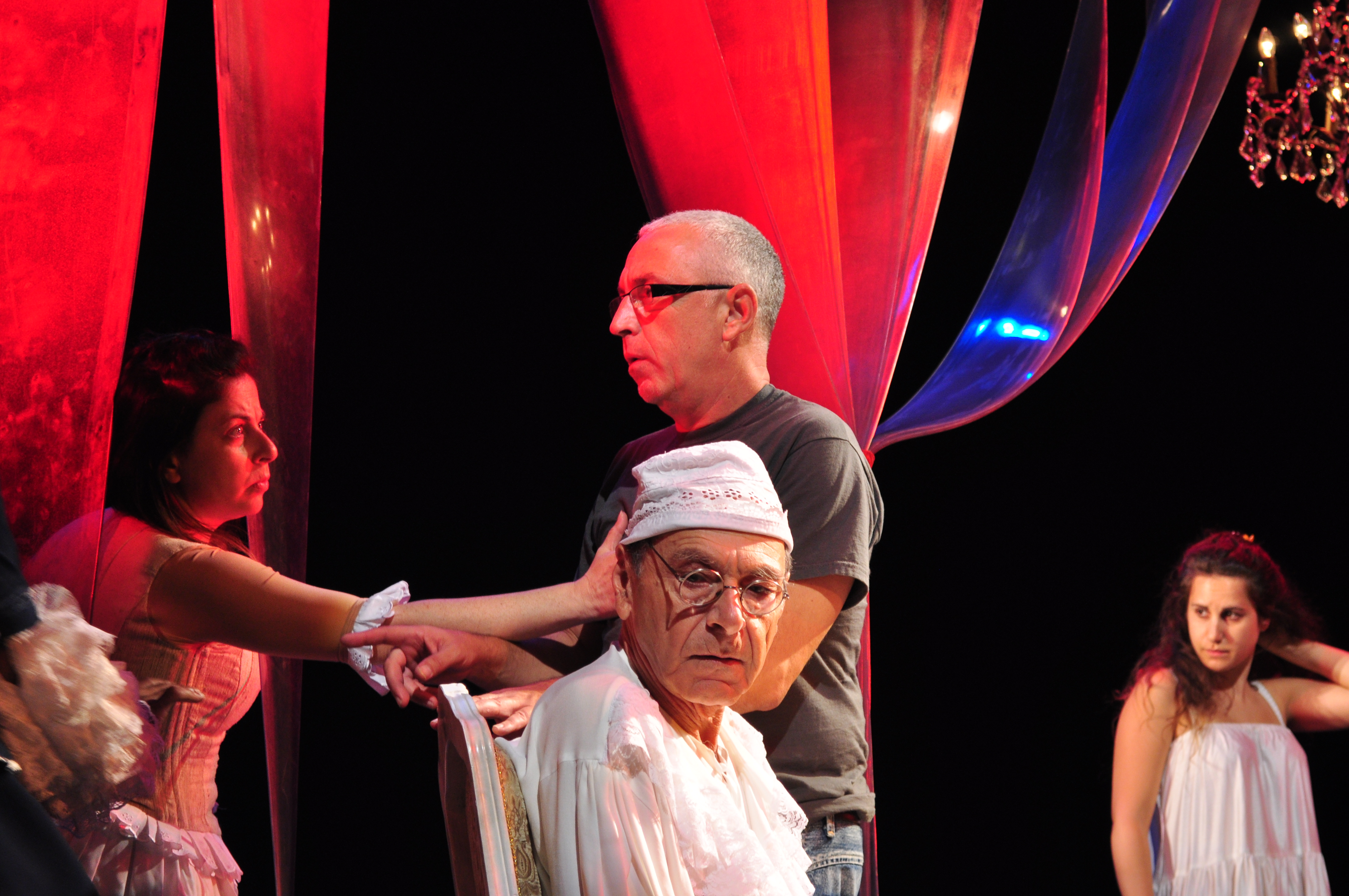 חזרות על "חולה המדומה" תיאטרון באר-שבע 2010 (שחקנים:יצחק חזקיה, שרית וינו-אלעד, ירדן קליין)-צלם ארז וייס 2010